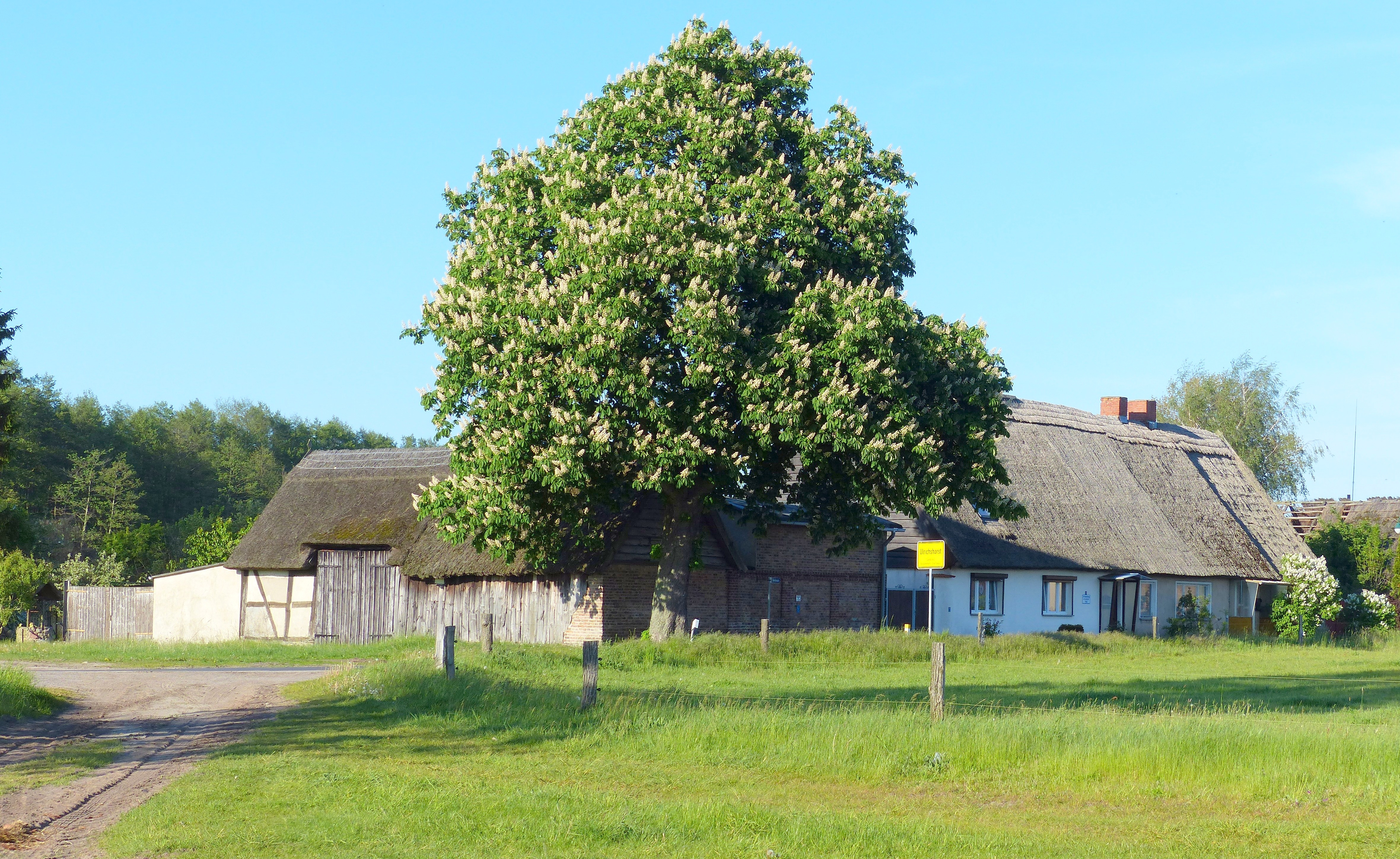 Westlicher Ortseingang von Ulrichshorst, Dorfstraße 57 und 56, Siedlerhäuser